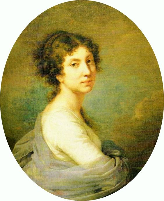 Johann Baptist Lampi (1751–1830): Marianna Zamoyska (1774–1846), Schloss Nieborów (Polen).